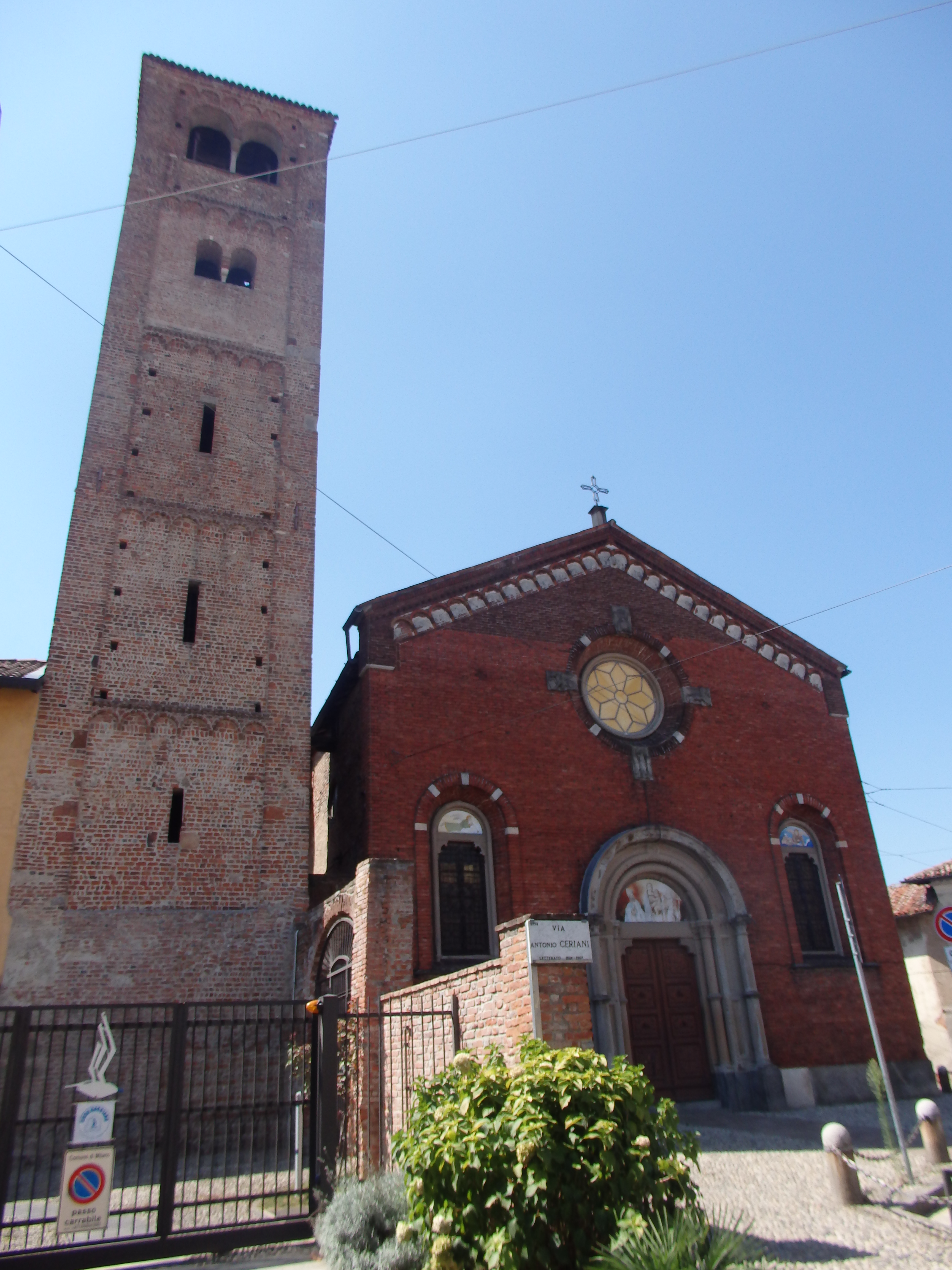 Baggio